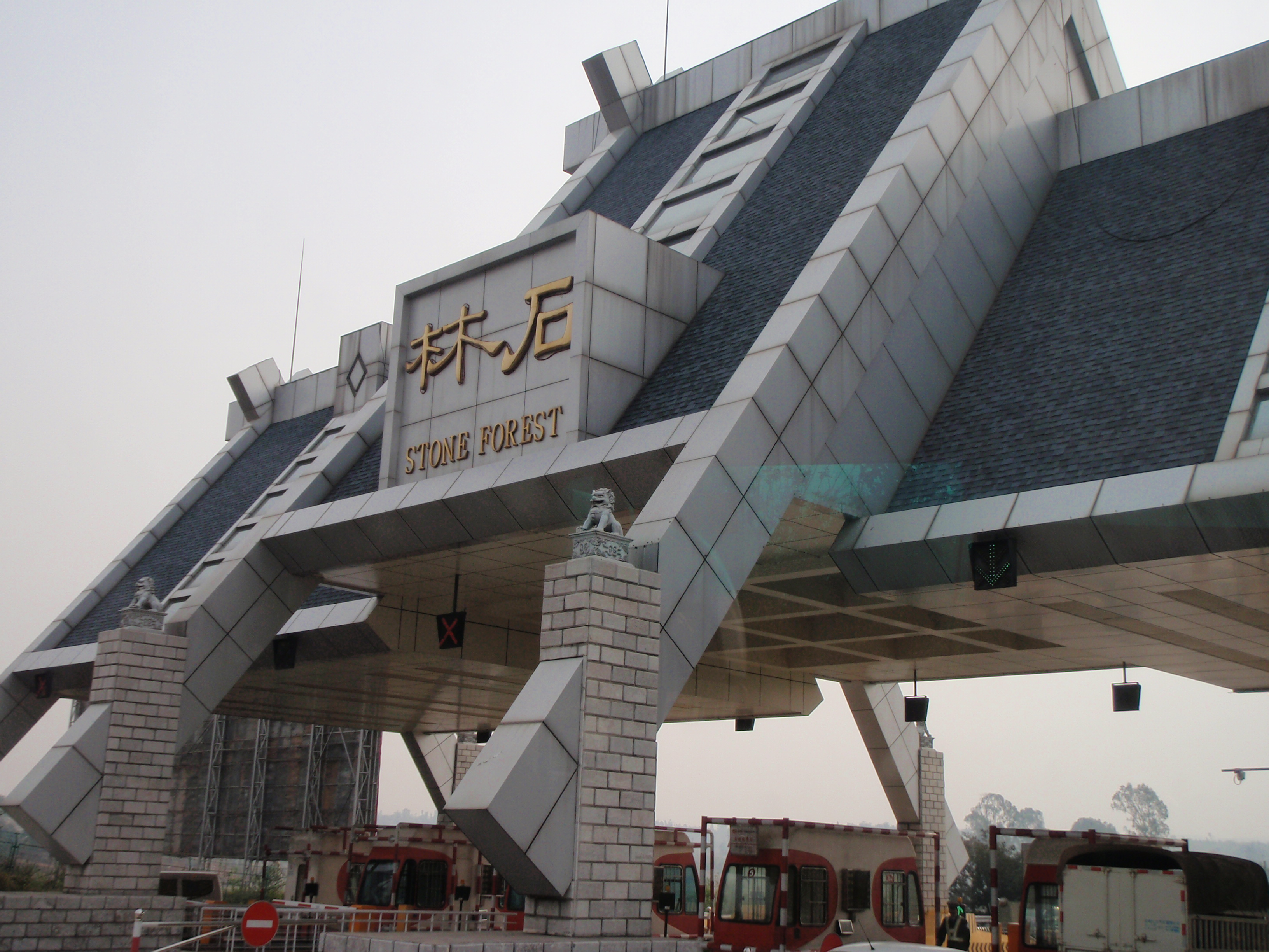 石林公路收费处